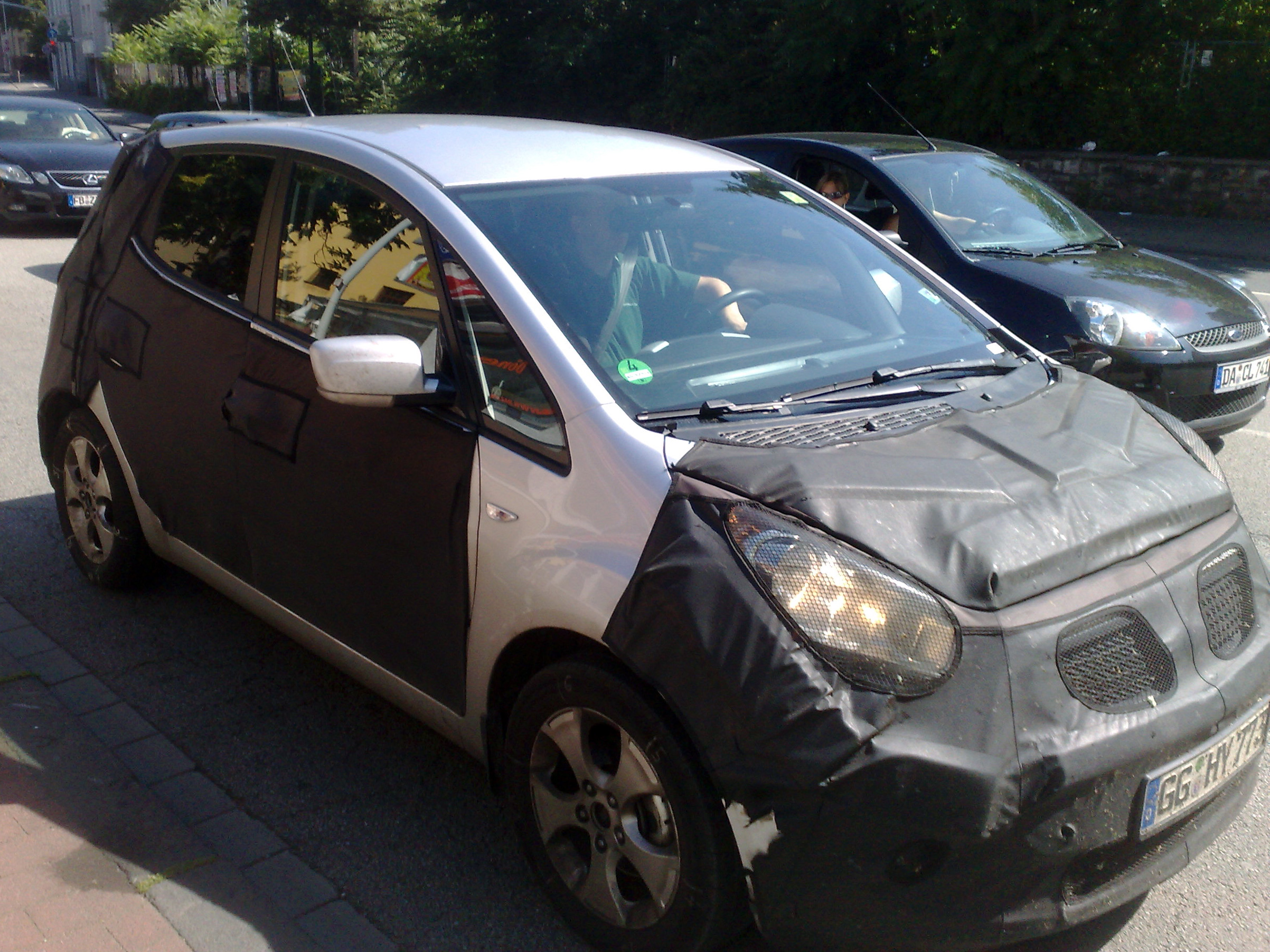 Erlkönig eines neuen Kia Venga, wurde als Studie No. 3 bereits auf dem Genfer Auto-Salon 2009 präsentiert